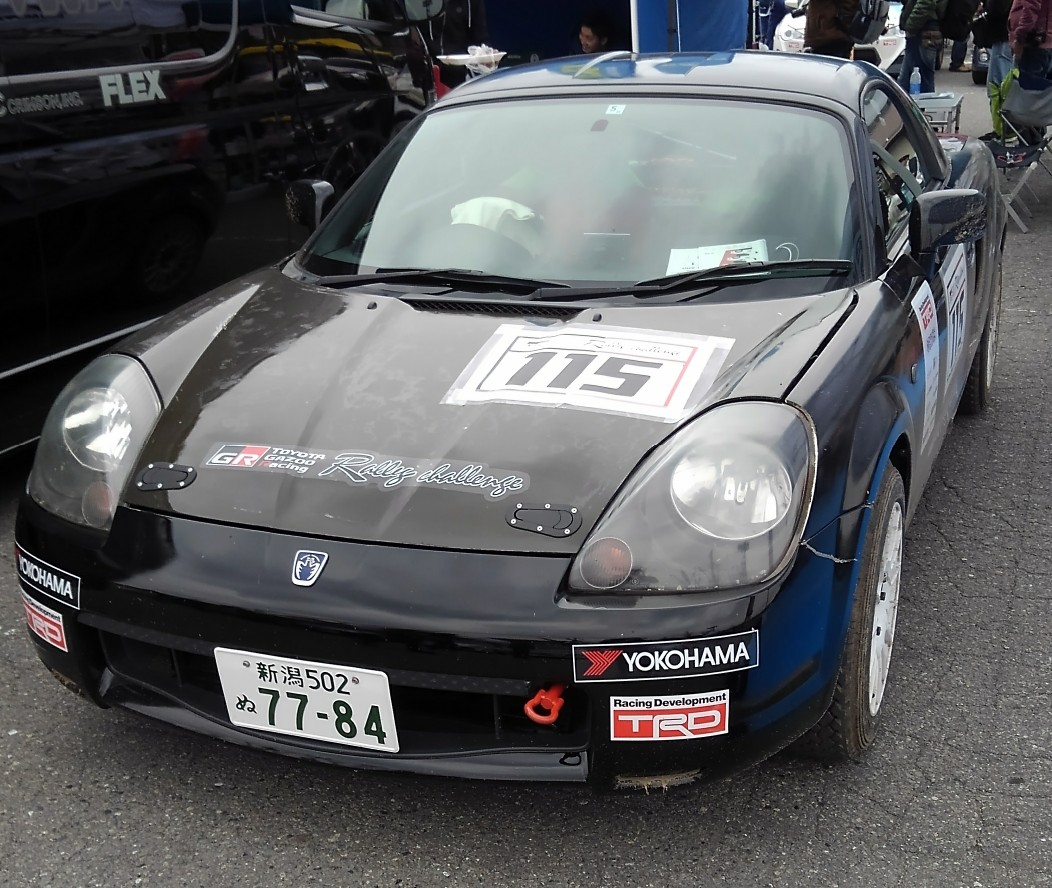 TGRラリーチャレンジに参戦するトヨタ・MR-S